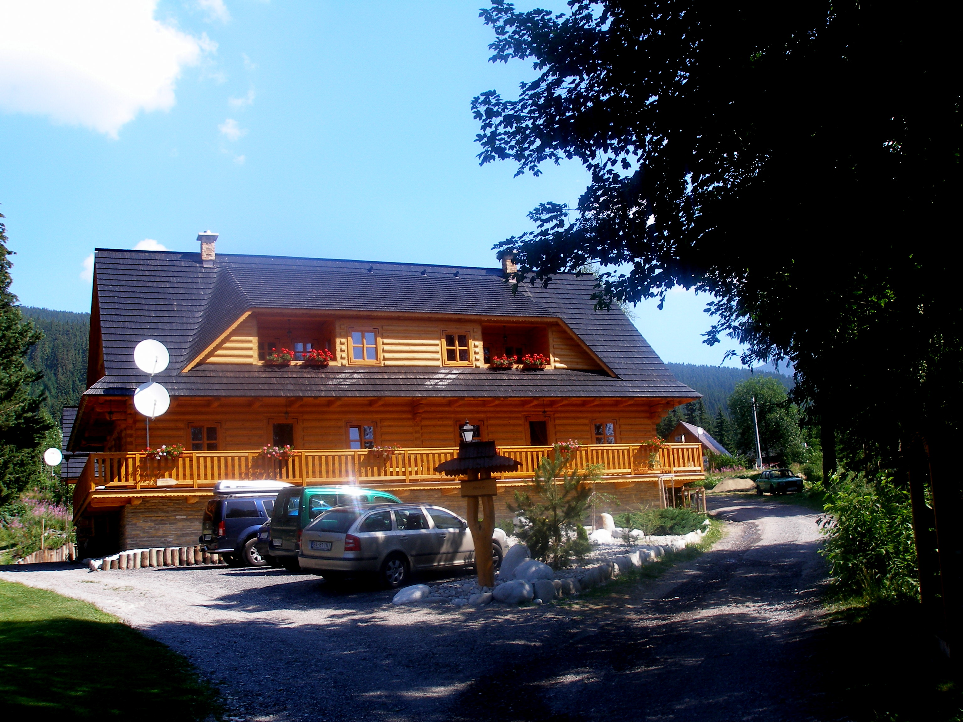 Osada Podbanské